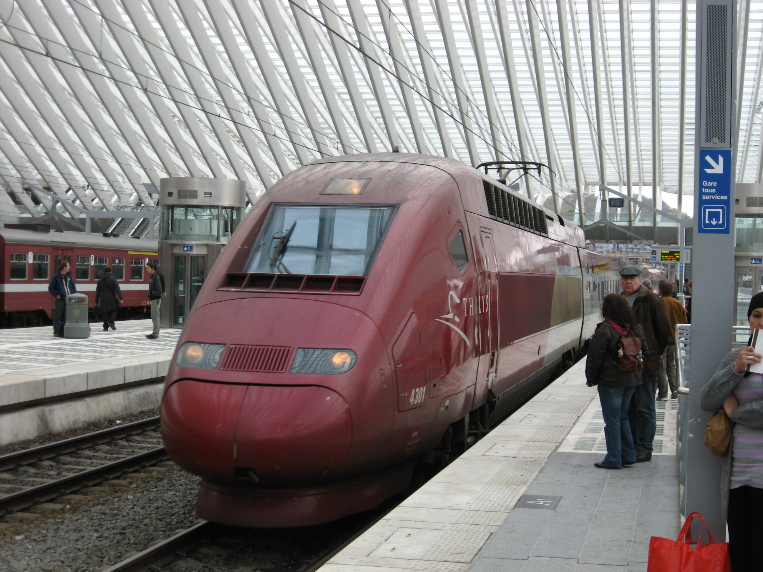 Een Thalys trein in Luik Guillemins